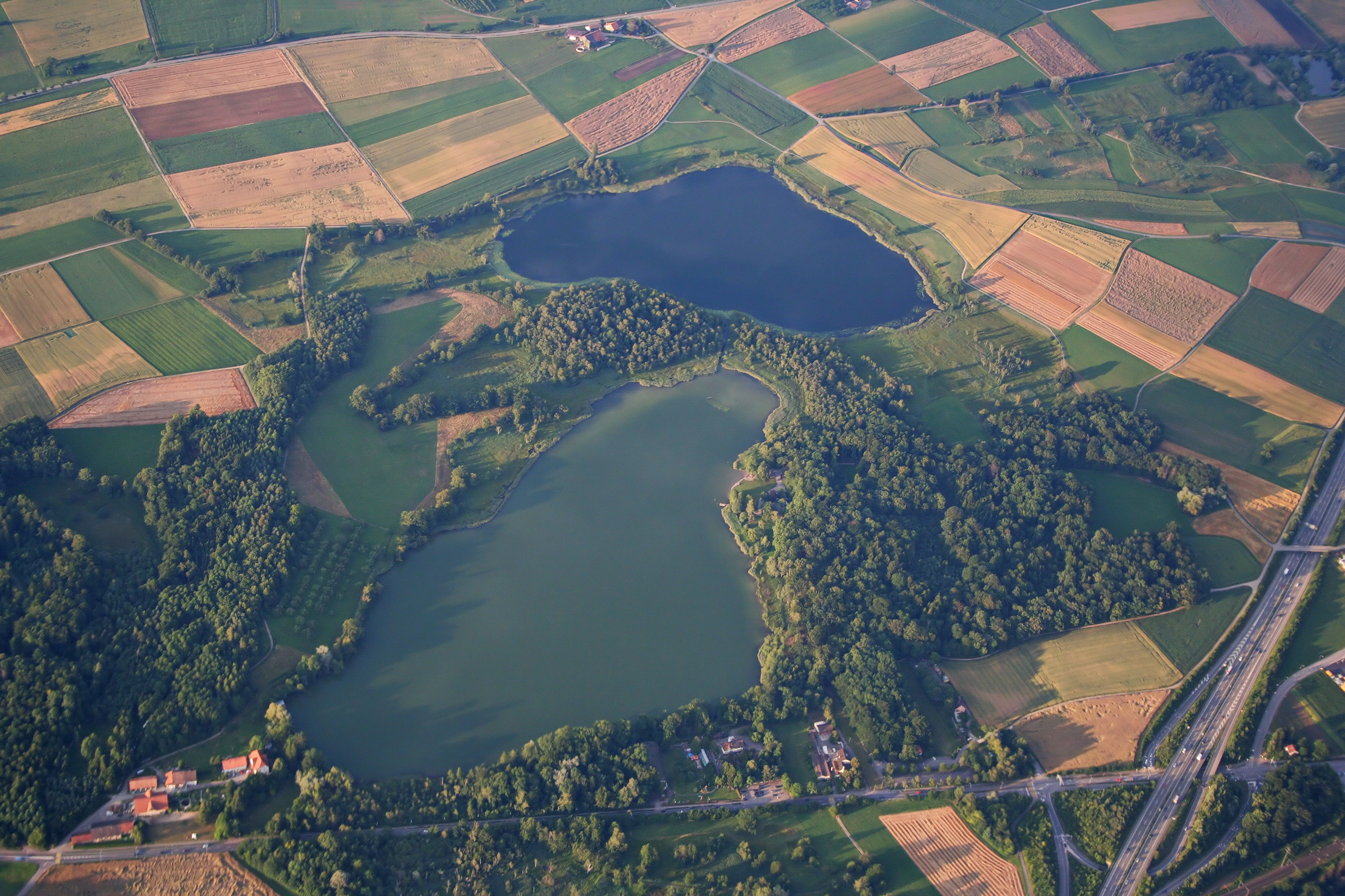 Links unten der untere, rechts oben der obere Katzensee, Luftaufnahme